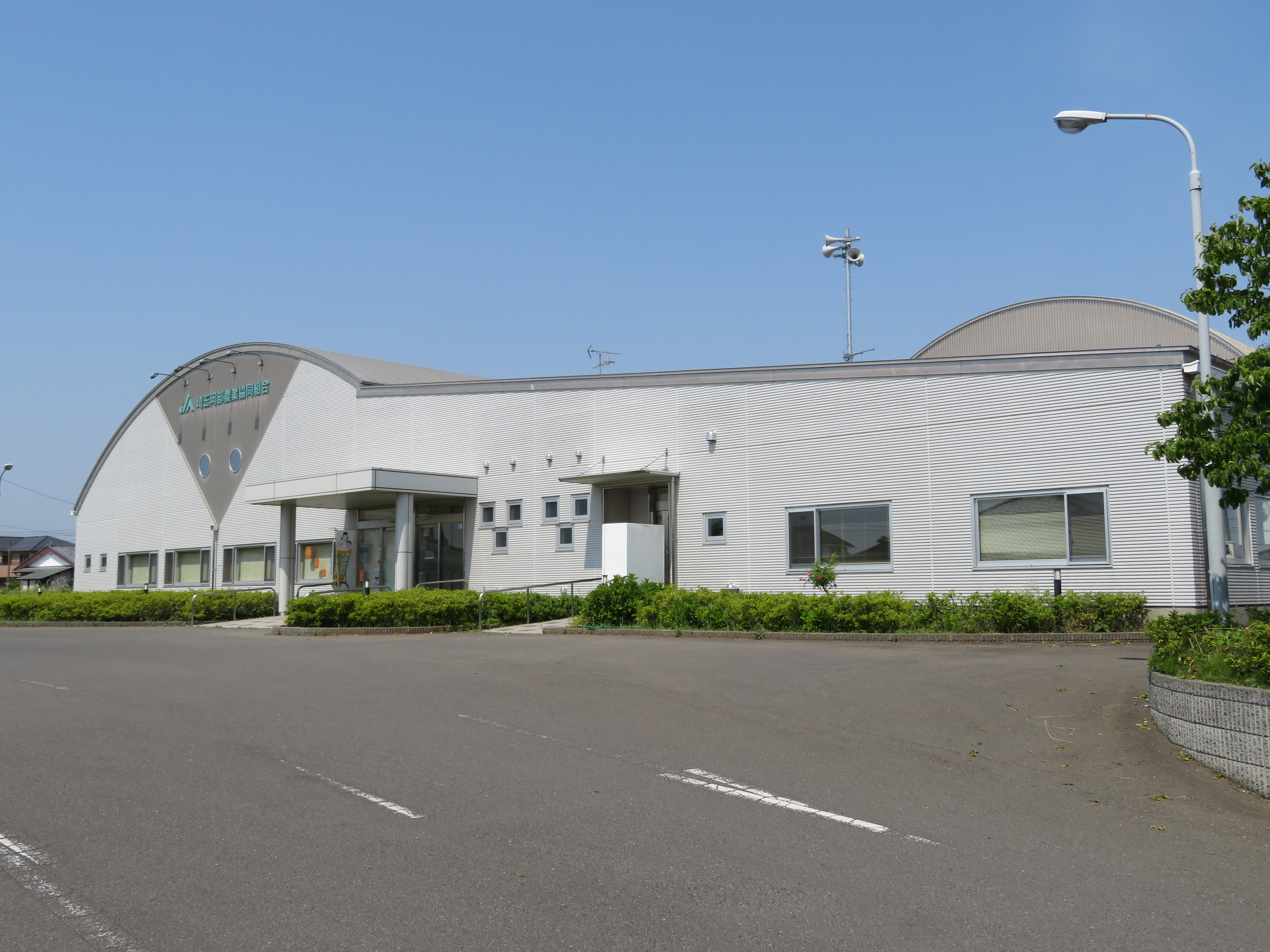 埼玉県深谷市にある埼玉岡部農業協同組合本店 Canon PowerShot SX720 HS